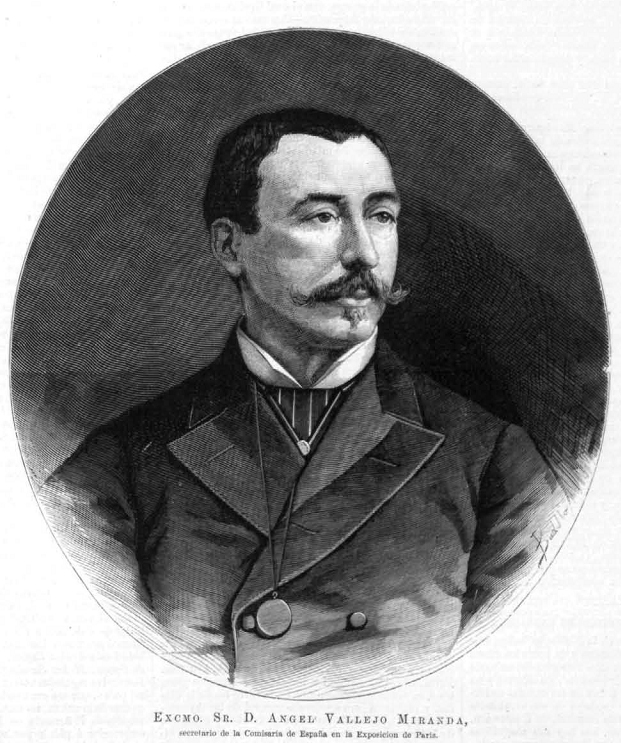 Retrato de Ángel Vallejo Miranda.